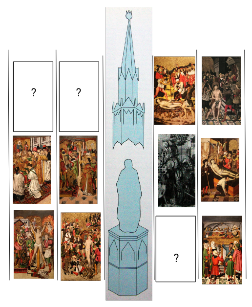 Reconstrucció de la imatge original del retaule, avui desmuntat. El MNAC conserva 9 compartiments d'aquest conjunt. Cinc compartiments van ser pintats per Jaume Huguet, tres pel Mestre de Castelsardo i un altre per un pintor anònim. Procedeix de l'església de Sant Vicenç de Sarrià, Barcelona.